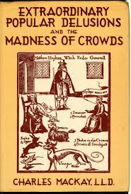 Charles Mackay